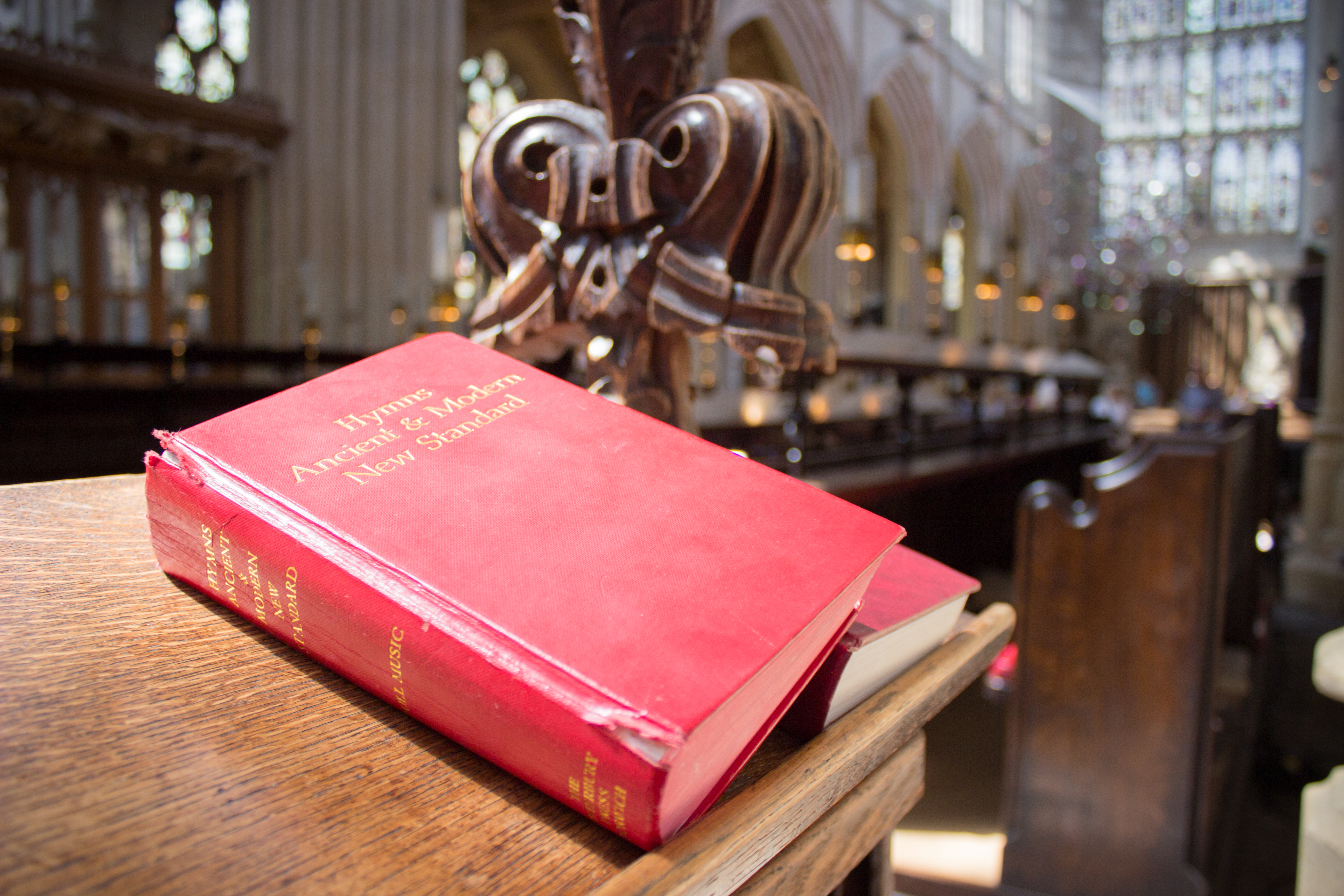 Abbey of Bath